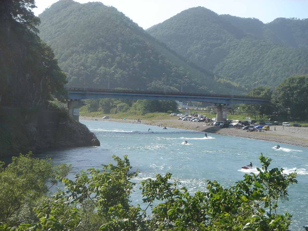 Chidori Bashi(千鳥橋(岐阜市)),Gifu,Gifu,Japan(岐阜県岐阜市)で左岸上流より撮影。川は長良川。